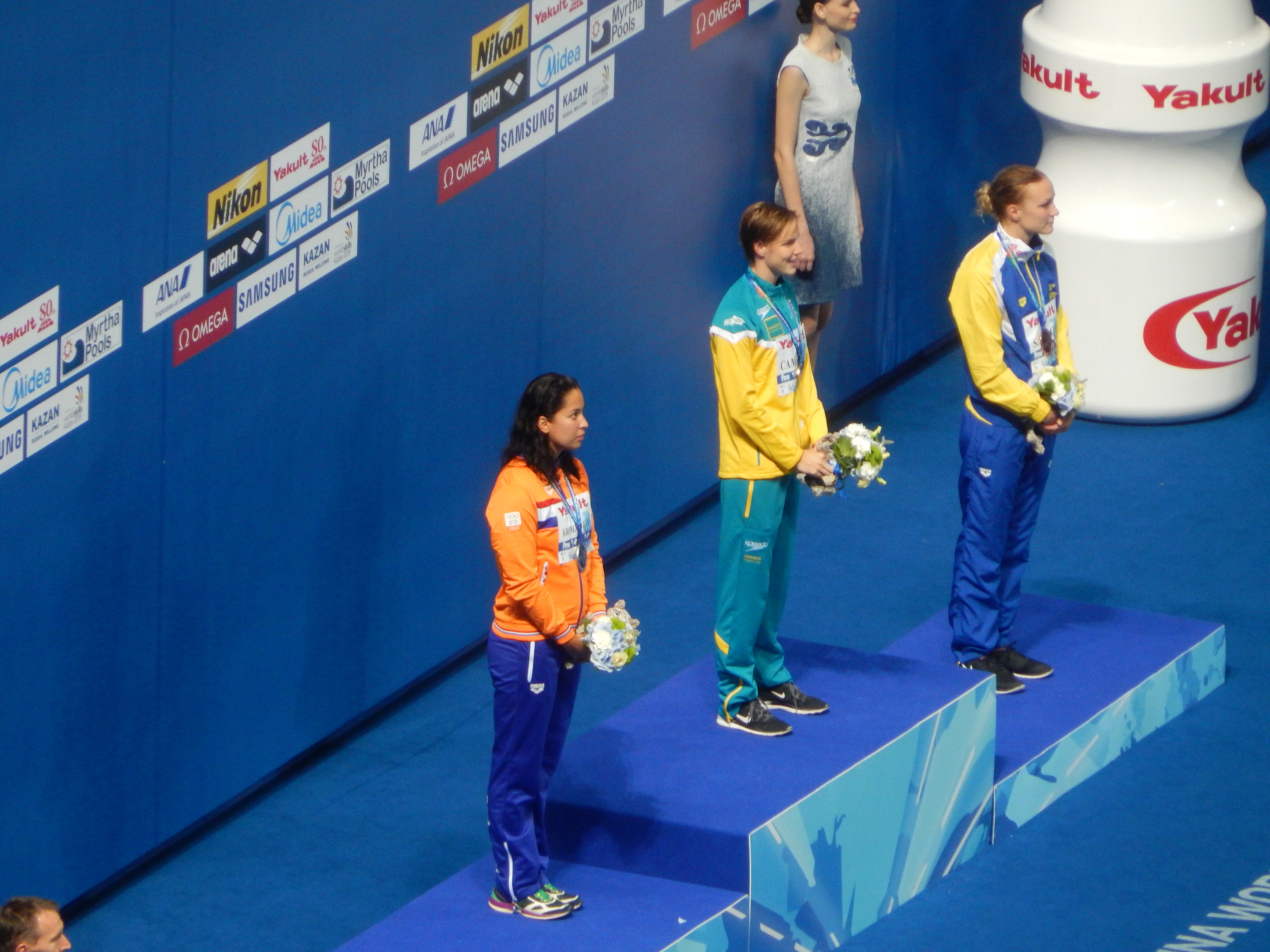 Церемония награждения призёров в плавании на 50 метров вольным стилем на чемпионате мира в Казани